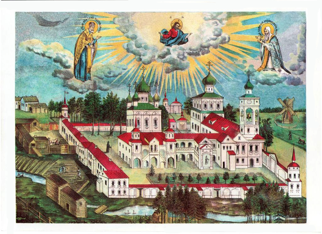 Вид новгородского второклассного Николаевского Вяжищского монастыря. XIX в.